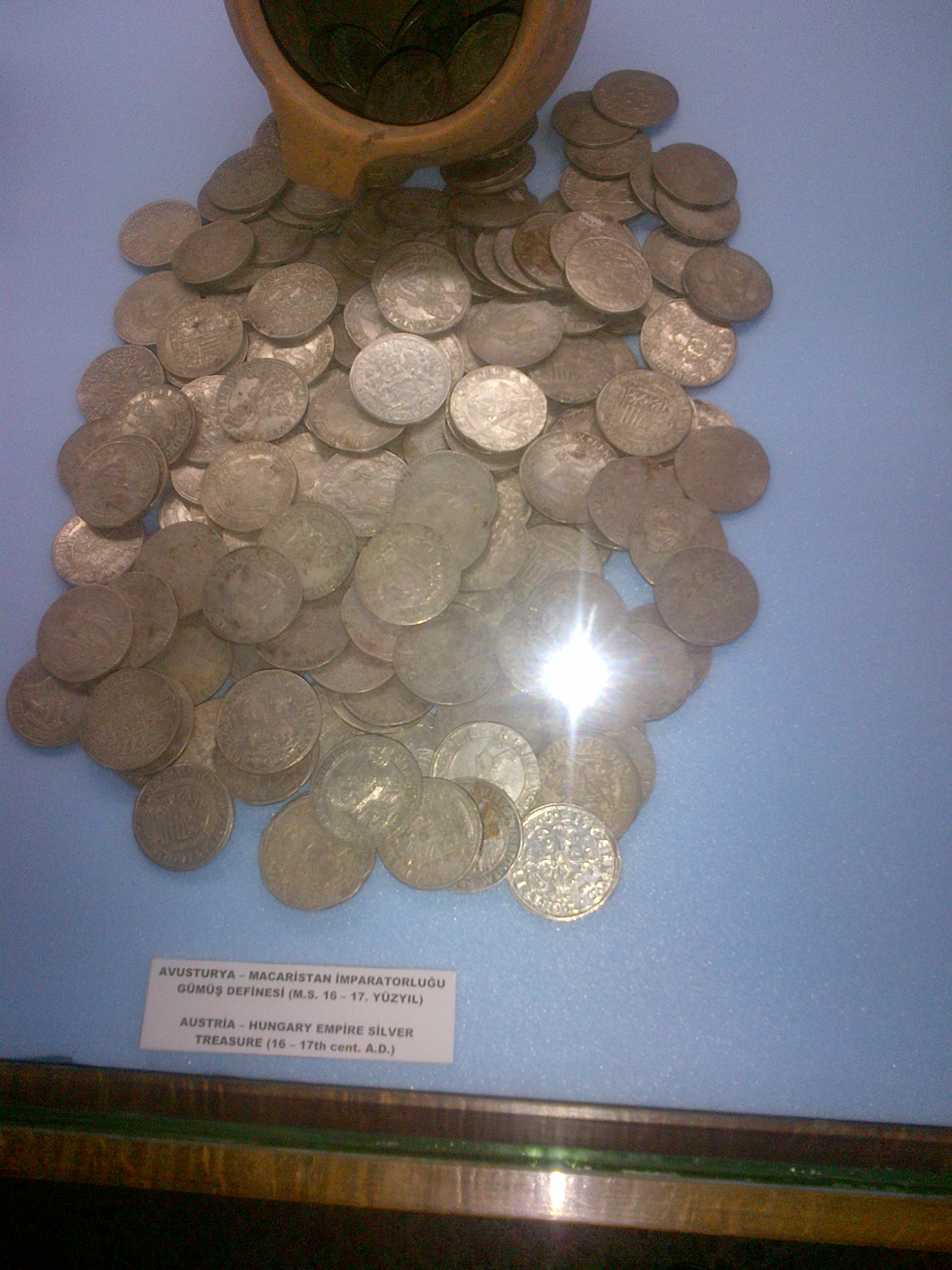 Monedas de plata del Imperio Austrohungaro en el Museo de Arquelogia de Samsun.